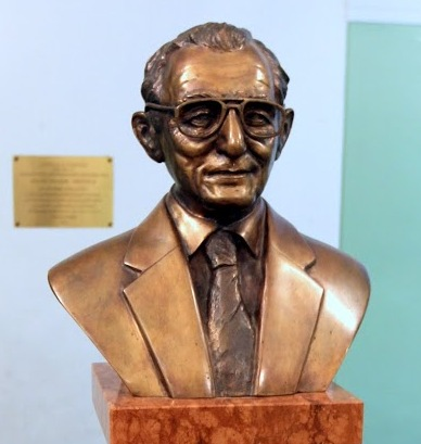 Balogh János szobra a Fasori Evangélikus Gimnáziumban